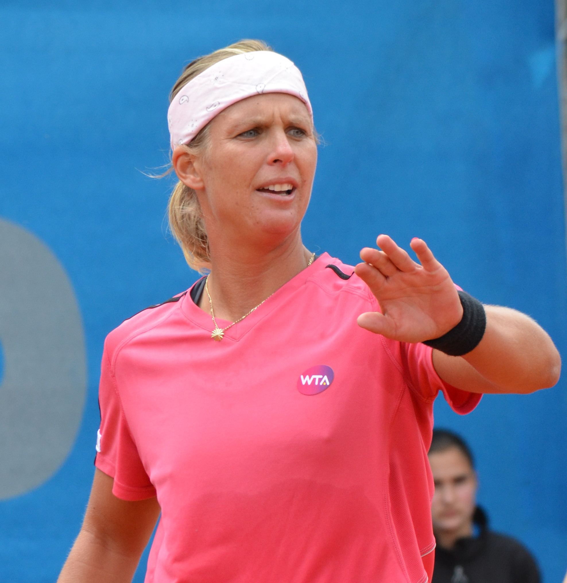 Sandra Klemenschits in der Doppelbegegnung des Nürnberger Versicherungscup 2015 mit Antonia Lottner gegen Beck/Irigoyen am 19.05.2015